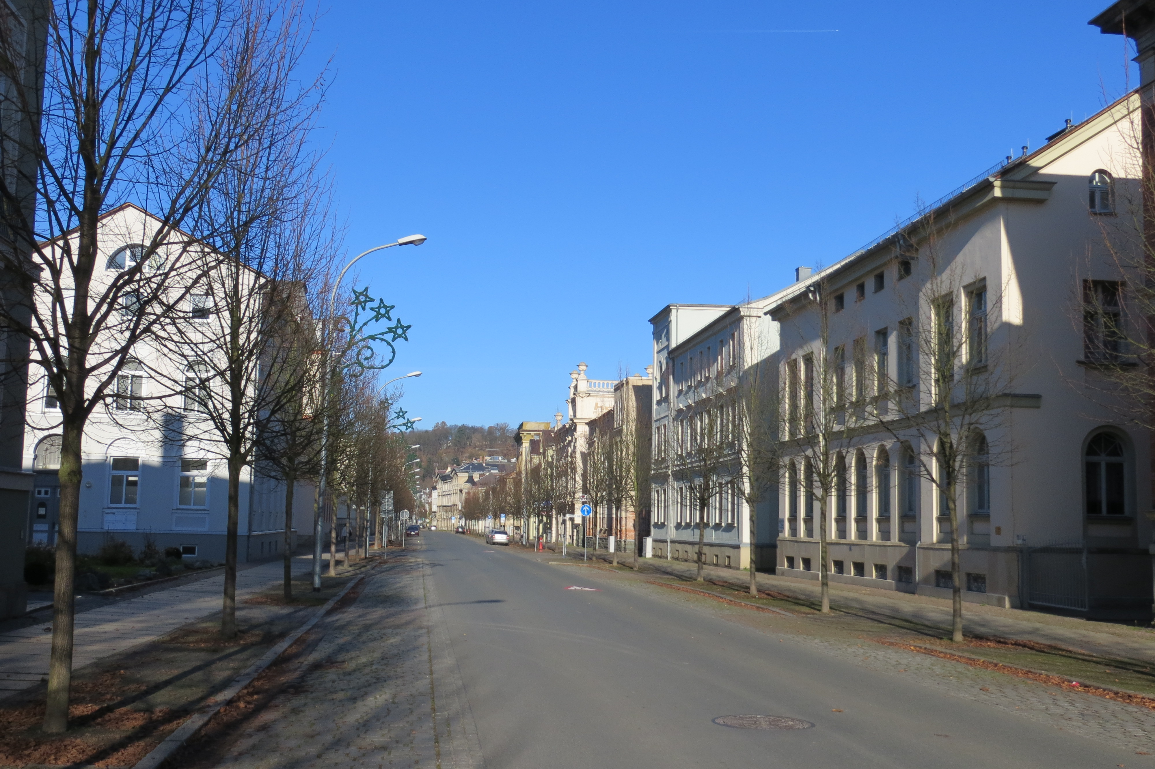 Carolinenstraße in Greiz